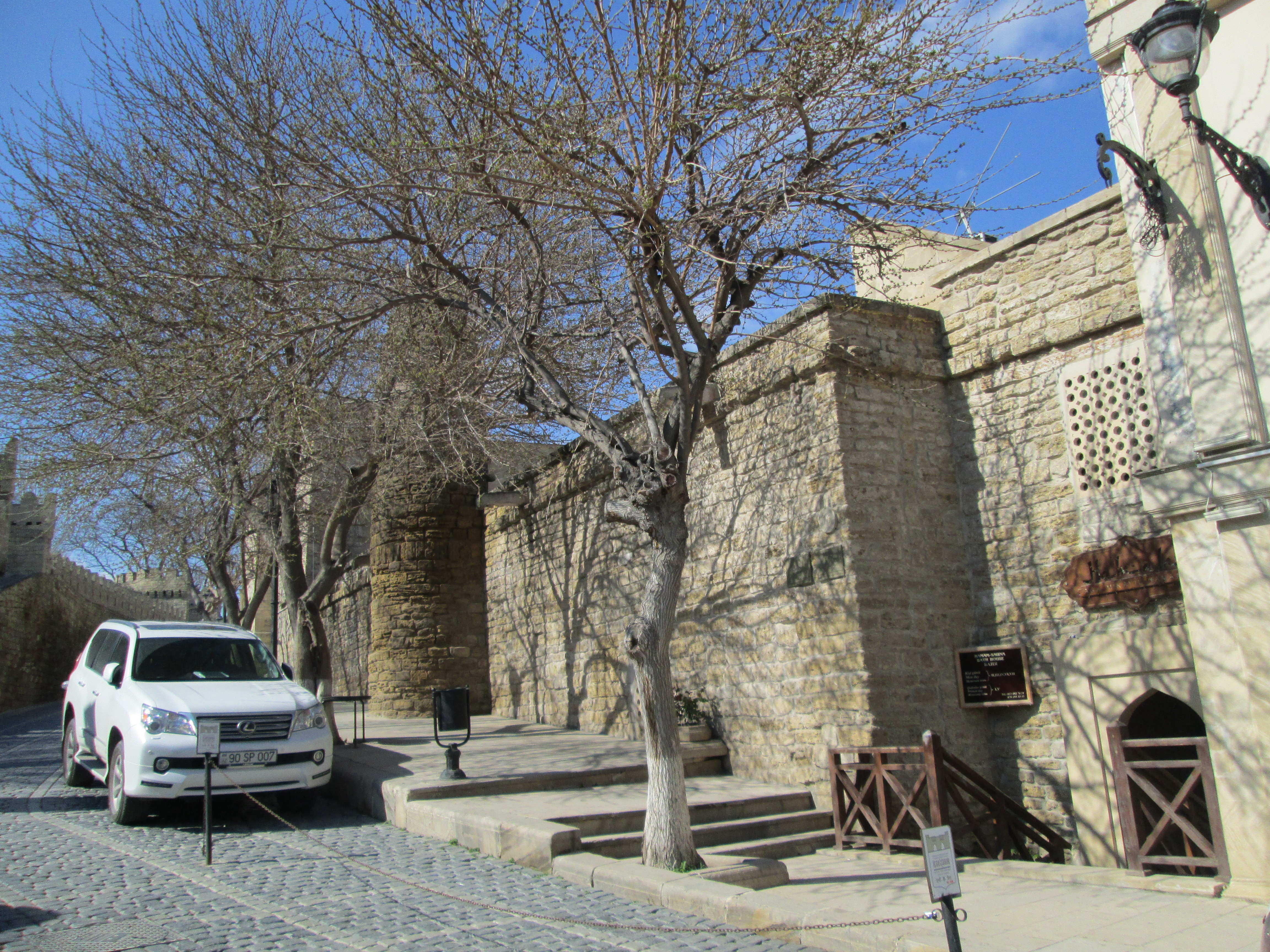 Ağa Mikayıl hamamı